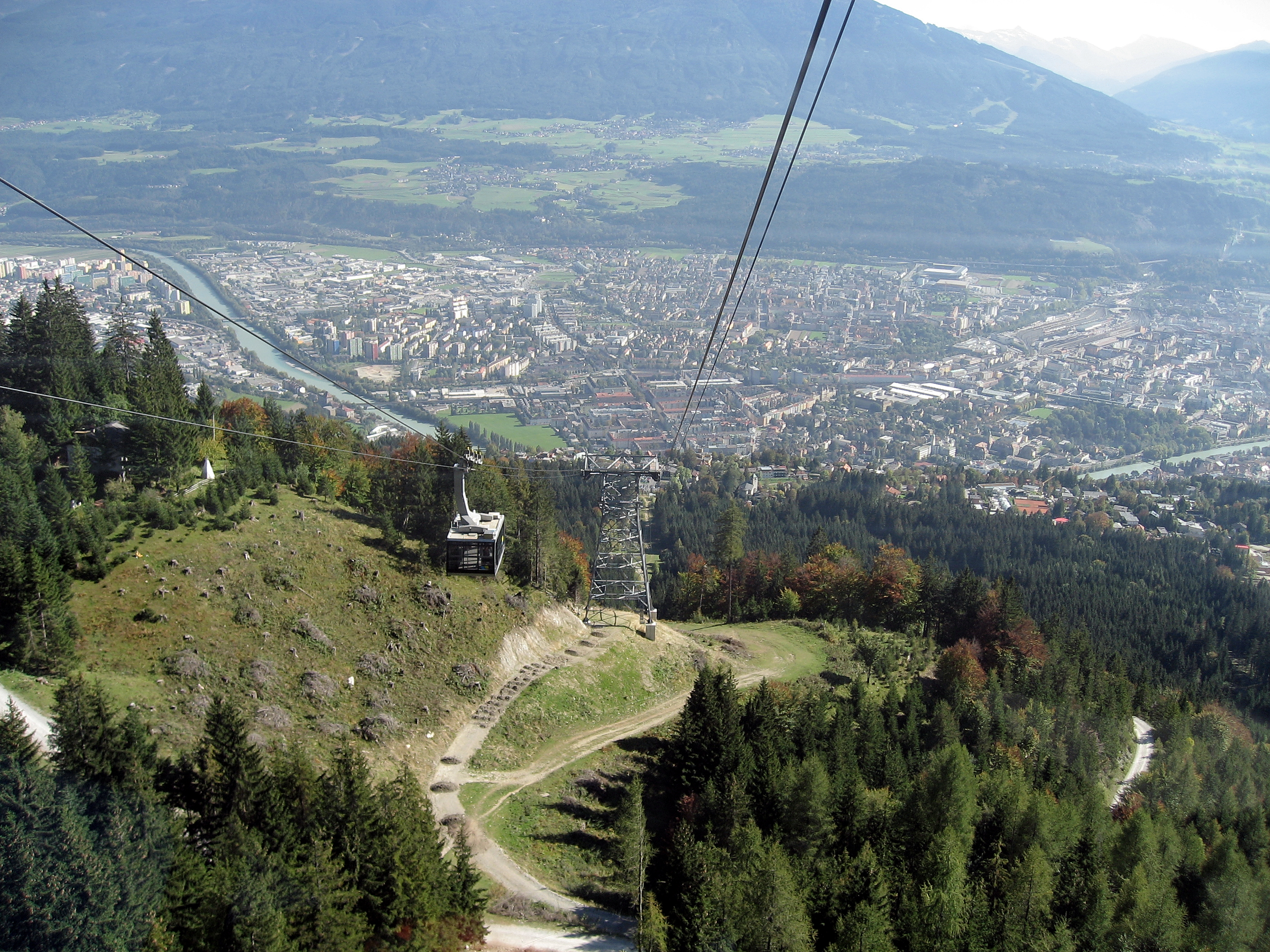 Österreich, Innsbruck,Seilbahn zur Seegrube Standseilbahn Hungerburg-Seegrube (1905 Meter)